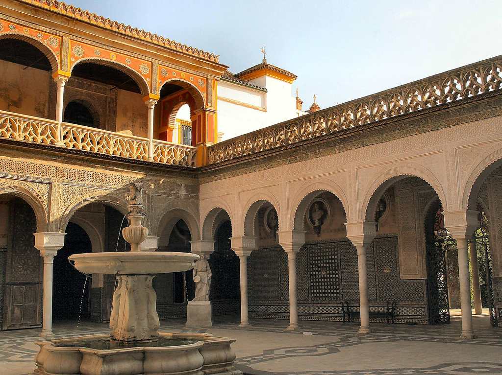 Patio principal de la Casa de Pilatos de Sevilla (Andalucía, España).